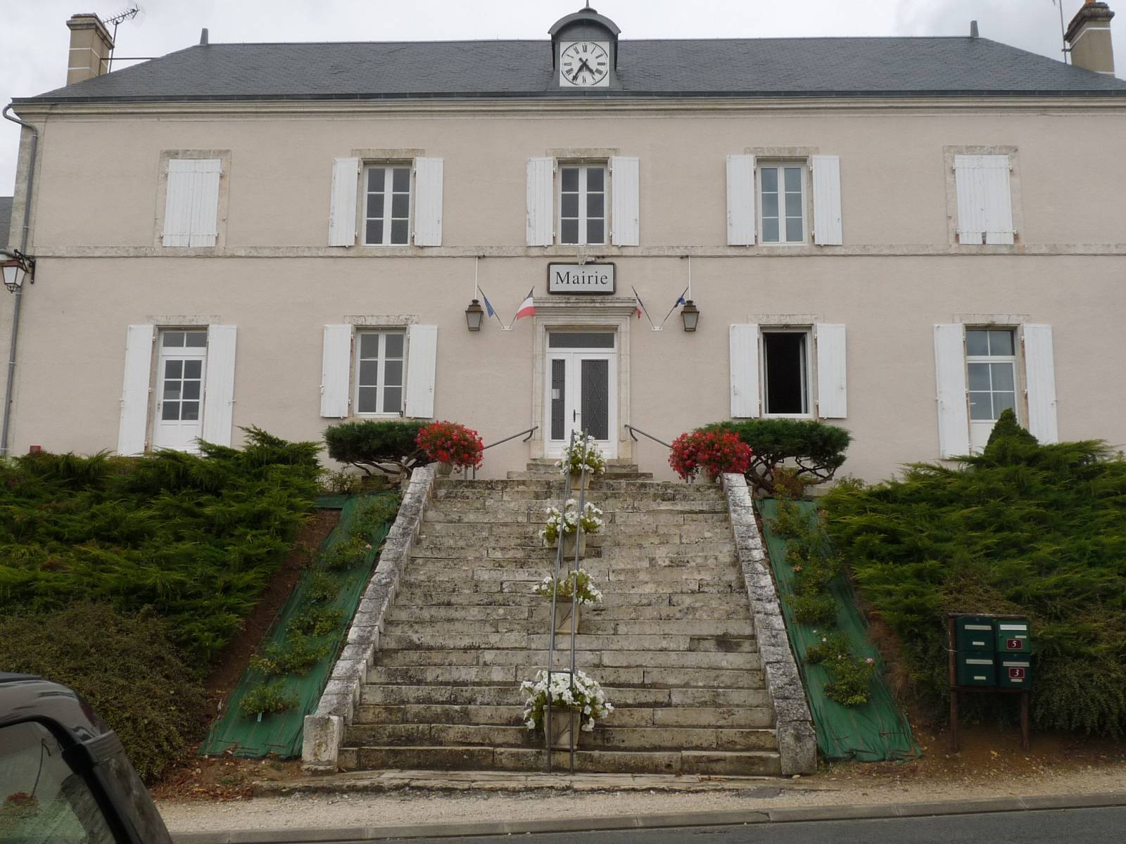 mairie d'Alloue, Charente, France